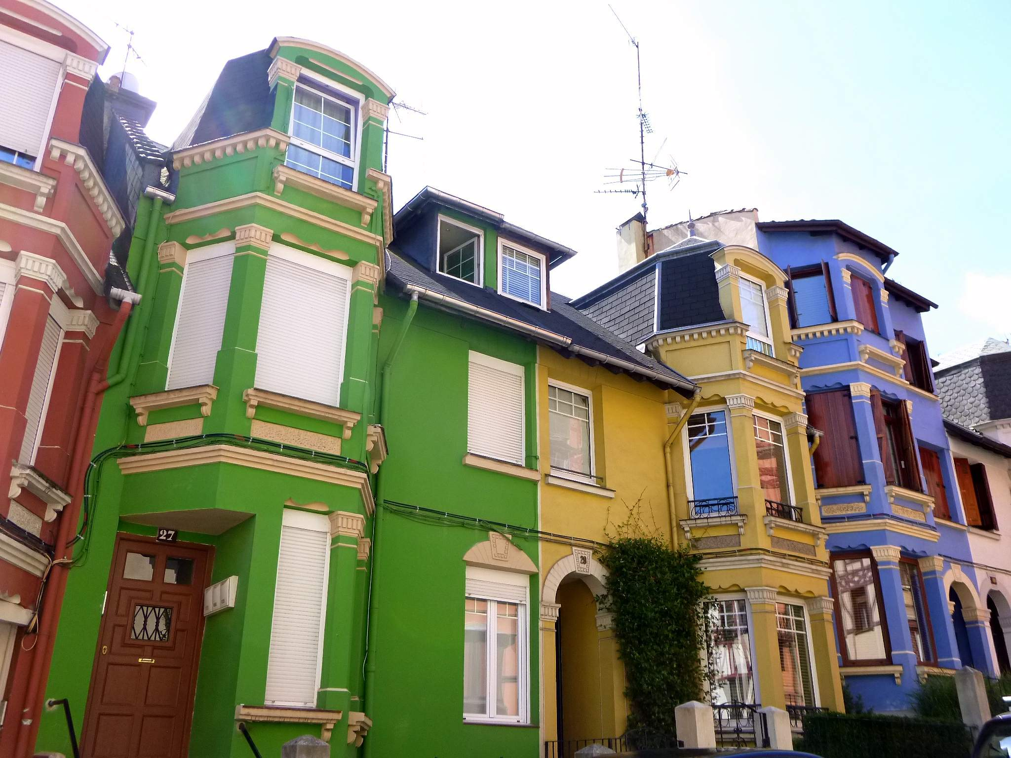 Bilbao - Calle Zuberoa (barrio de Iralabarri, distrito de Errekalde)